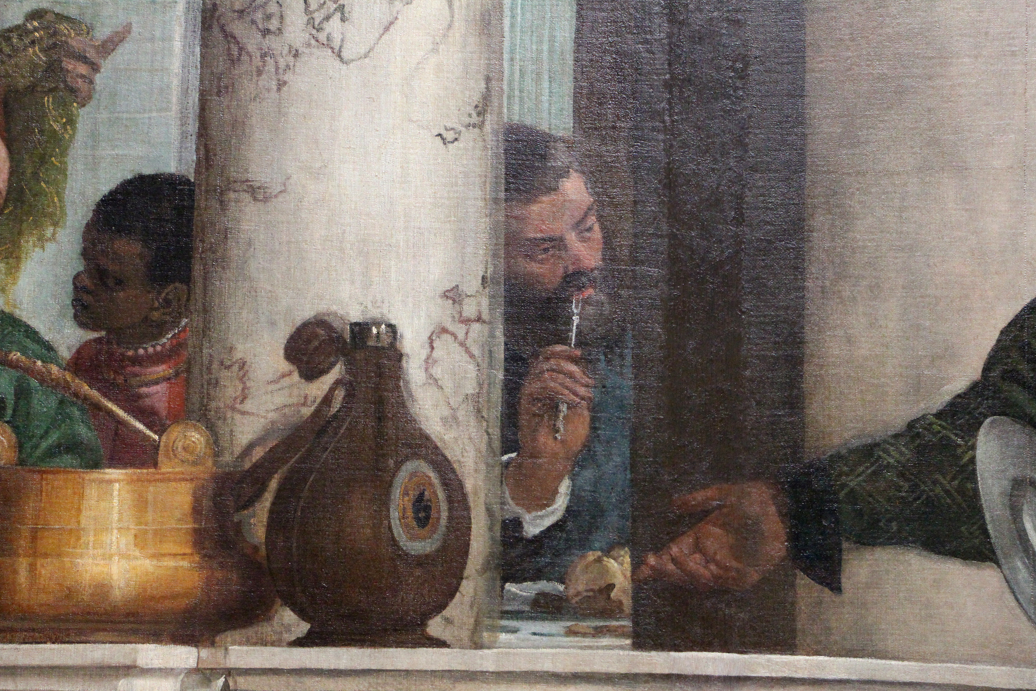 Gallerie dell'Accademia - MIBAC The making of this document was supported by Wikimedia CH. (Submit your project!) For all the files concerned, please see the category Supported by Wikimedia CH. This is a photo of a monument which is part of cultural heritage of Italy.